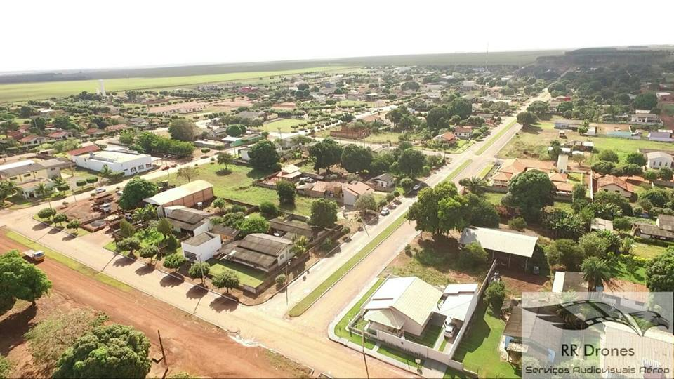 Município de Santa Rita do Trivelato